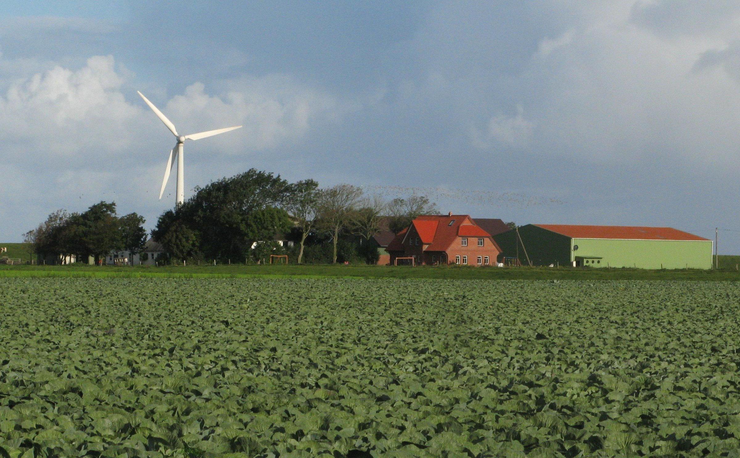 farm in hellschen-heringsand-unterschaar